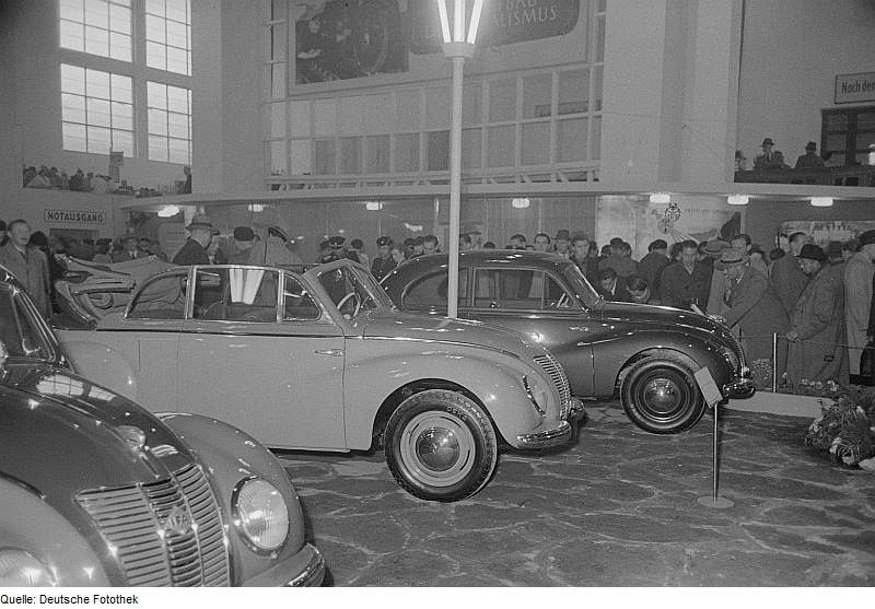 Original image description from the Deutsche Fotothek Fahrzeuge der IFA in der Fahrzeugausstellung